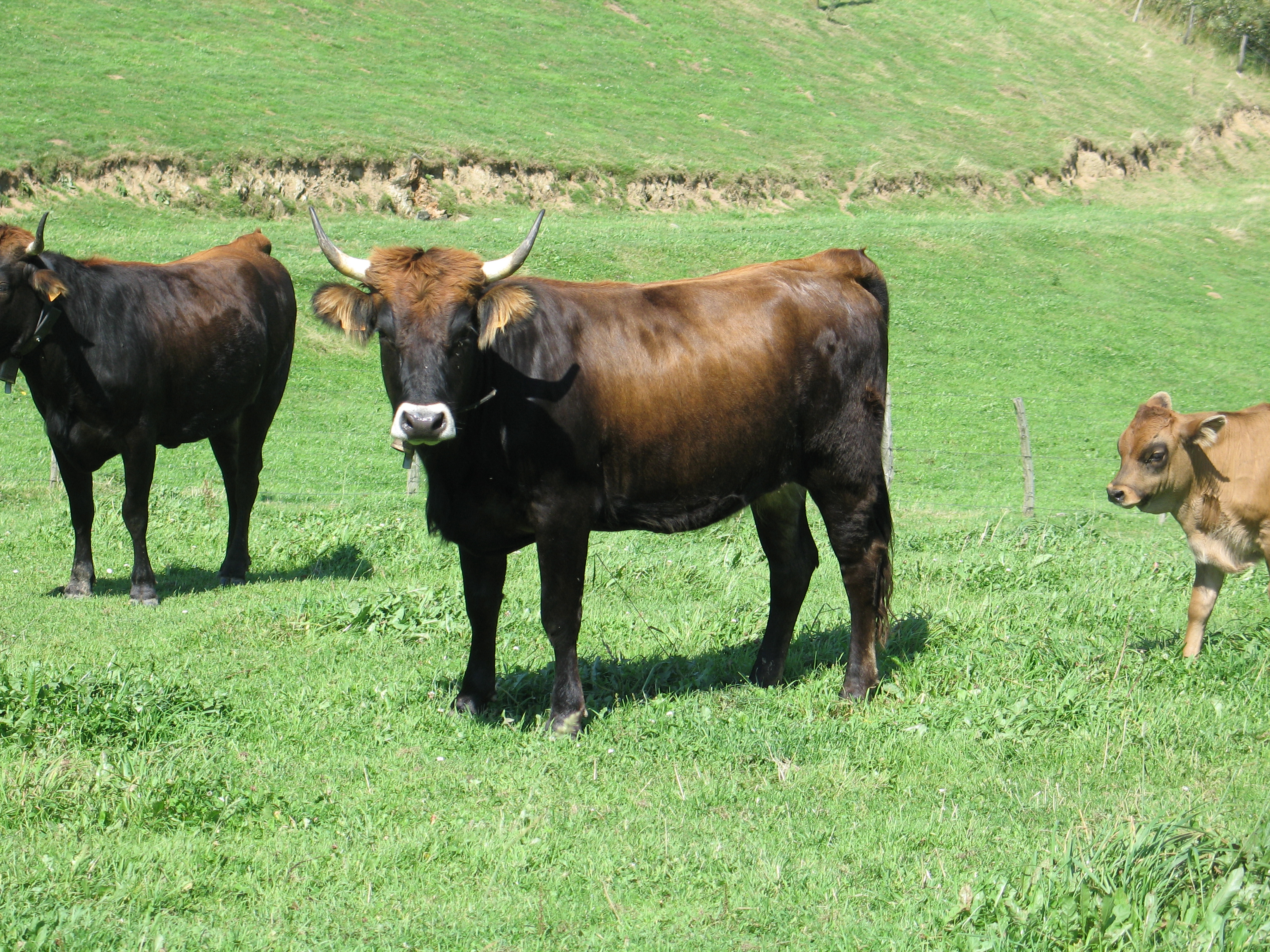 Arraza Terreñako behia bere txahalarekin